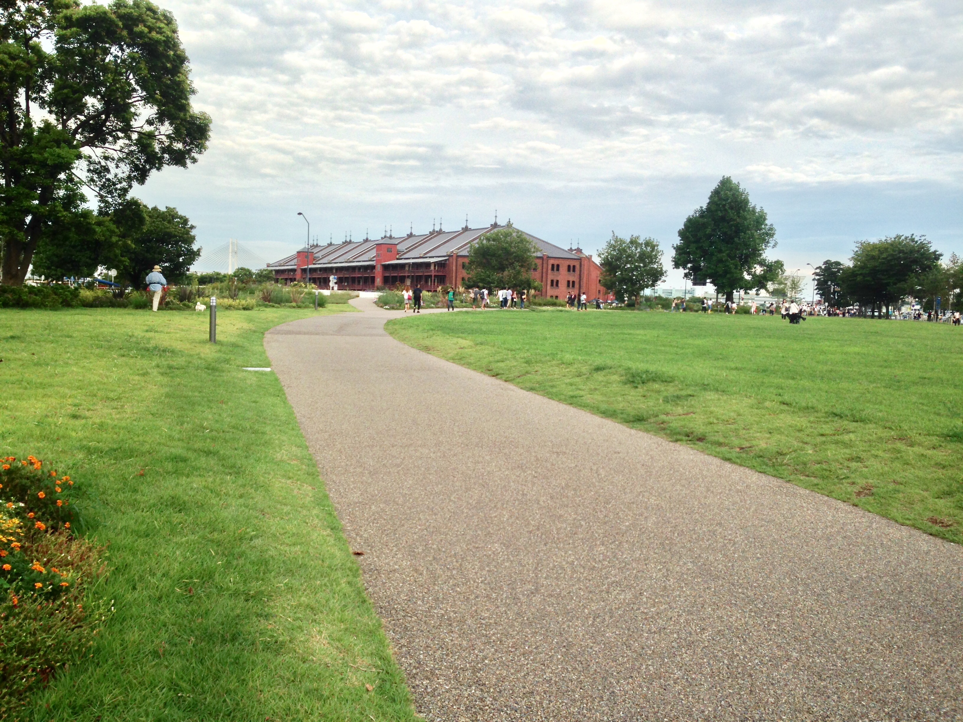 新港中央広場。広場の通路は「開港の道」となっており、赤レンガ倉庫付近に至る。